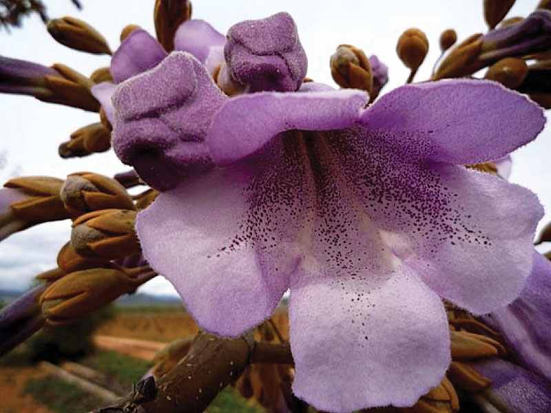 Floare Oxytree